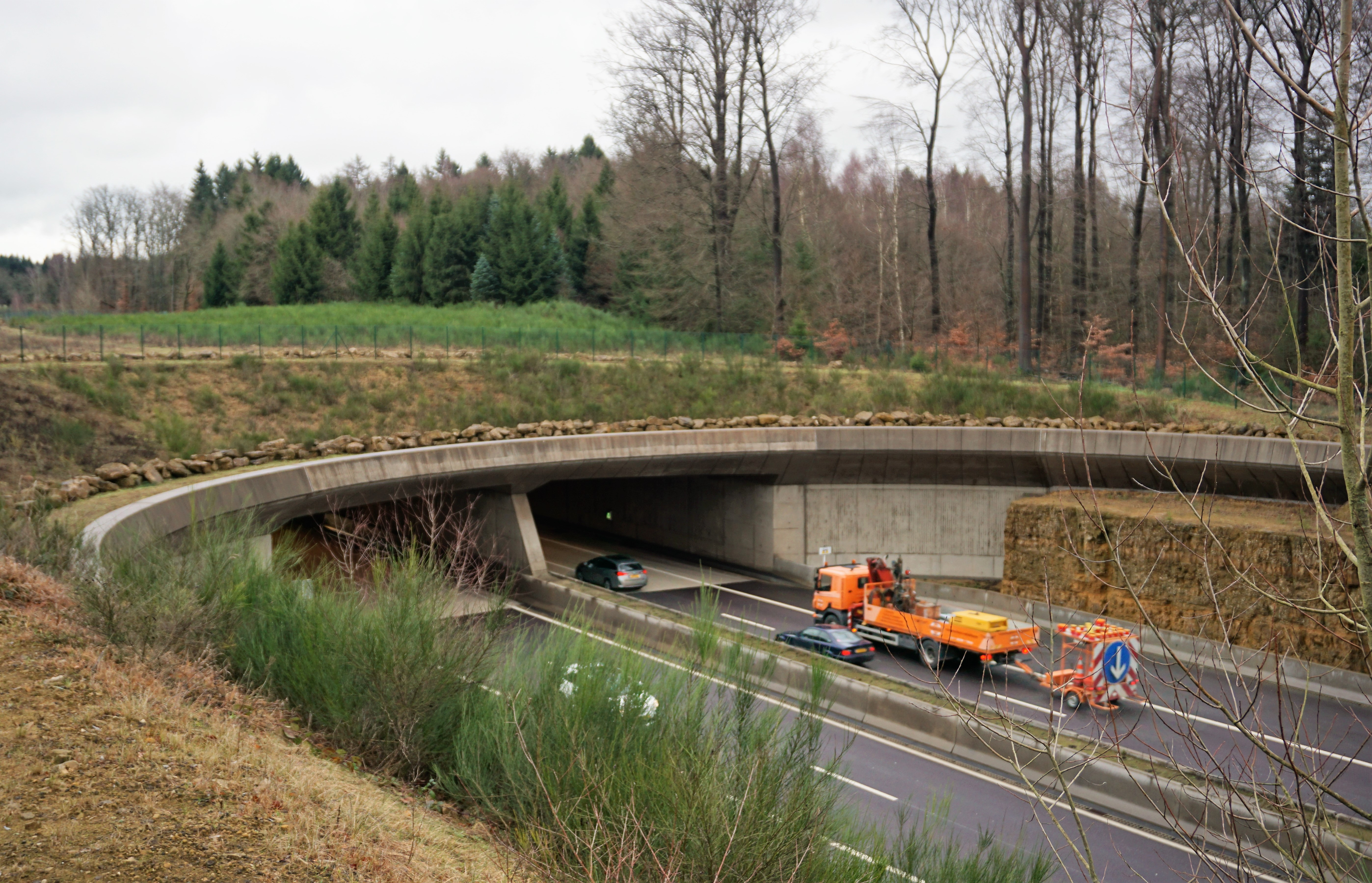 Écoduc « Réngelbur » enjambant les 4 voies de l'autoroute A7 au Grand-Duché de Luxembourg, commune de Steinsel. Accès sud du tunnel autoroutier.